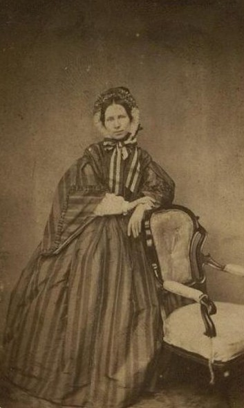 Княгиня Александра Алексеевна Оболенская (1831-1890)